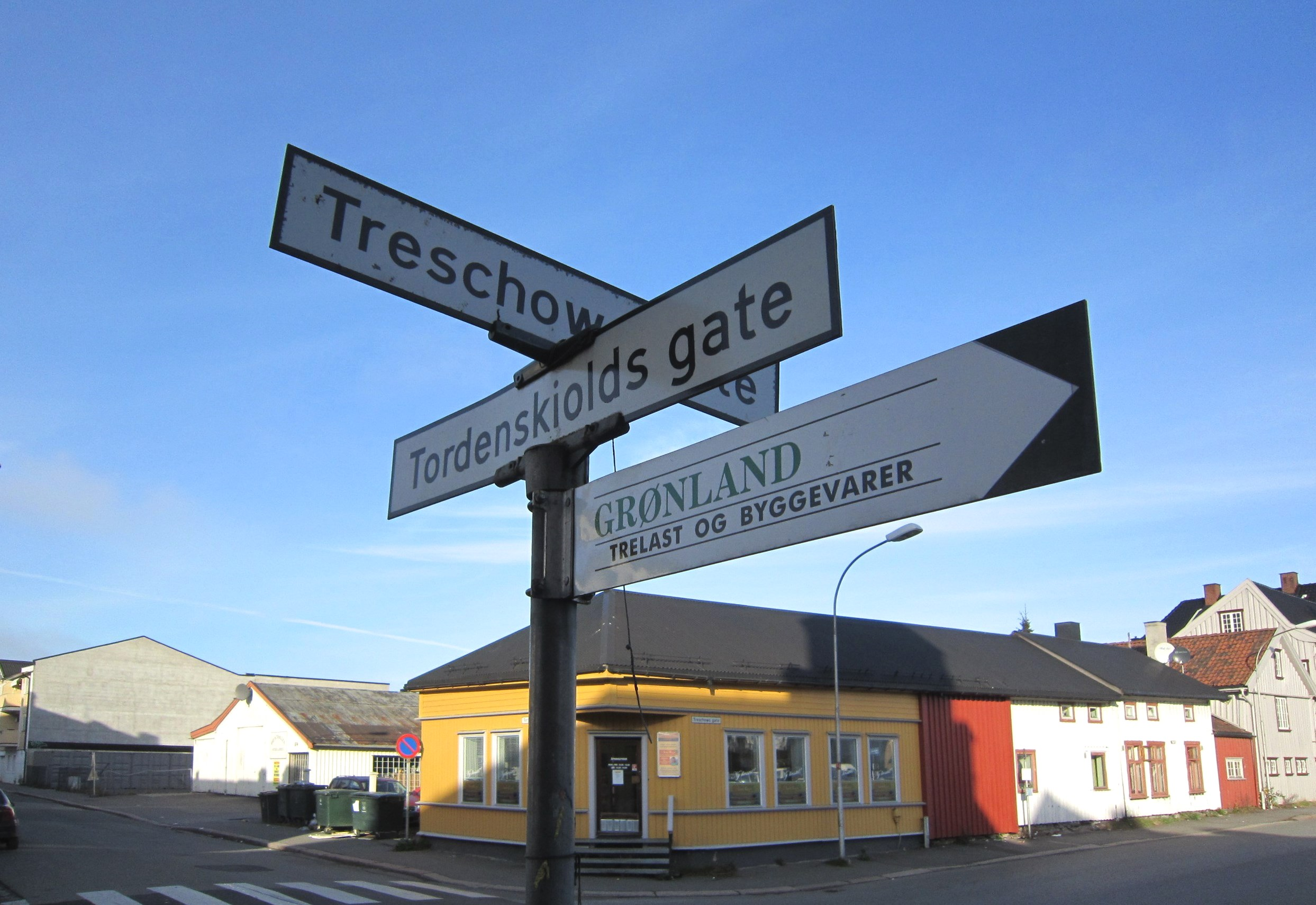 Der Tordenskiolds gate krysser Treschws gate i Drammen, forgrenes fylkesvei 41.